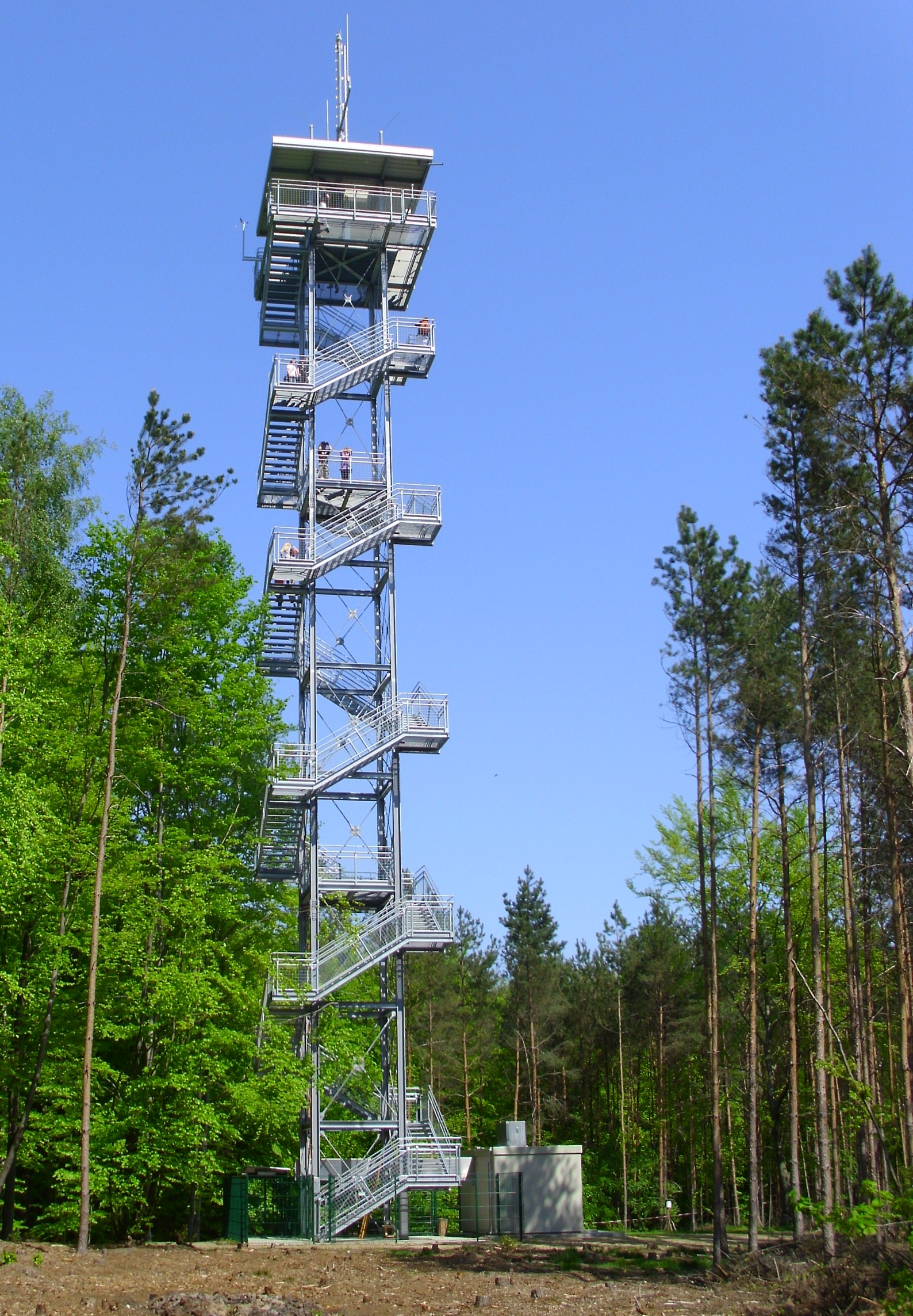 Aussichtsturm in den Rauenschen Bergen, 2011 erbaut.